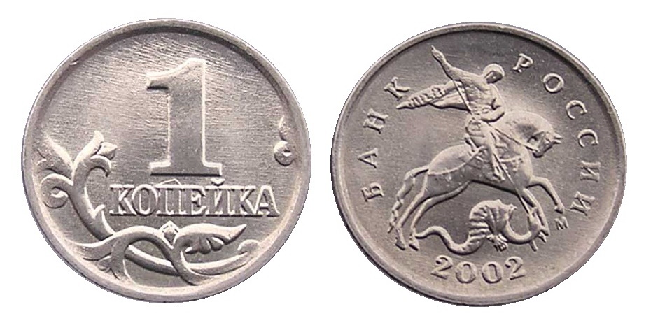 1 копейка РФ